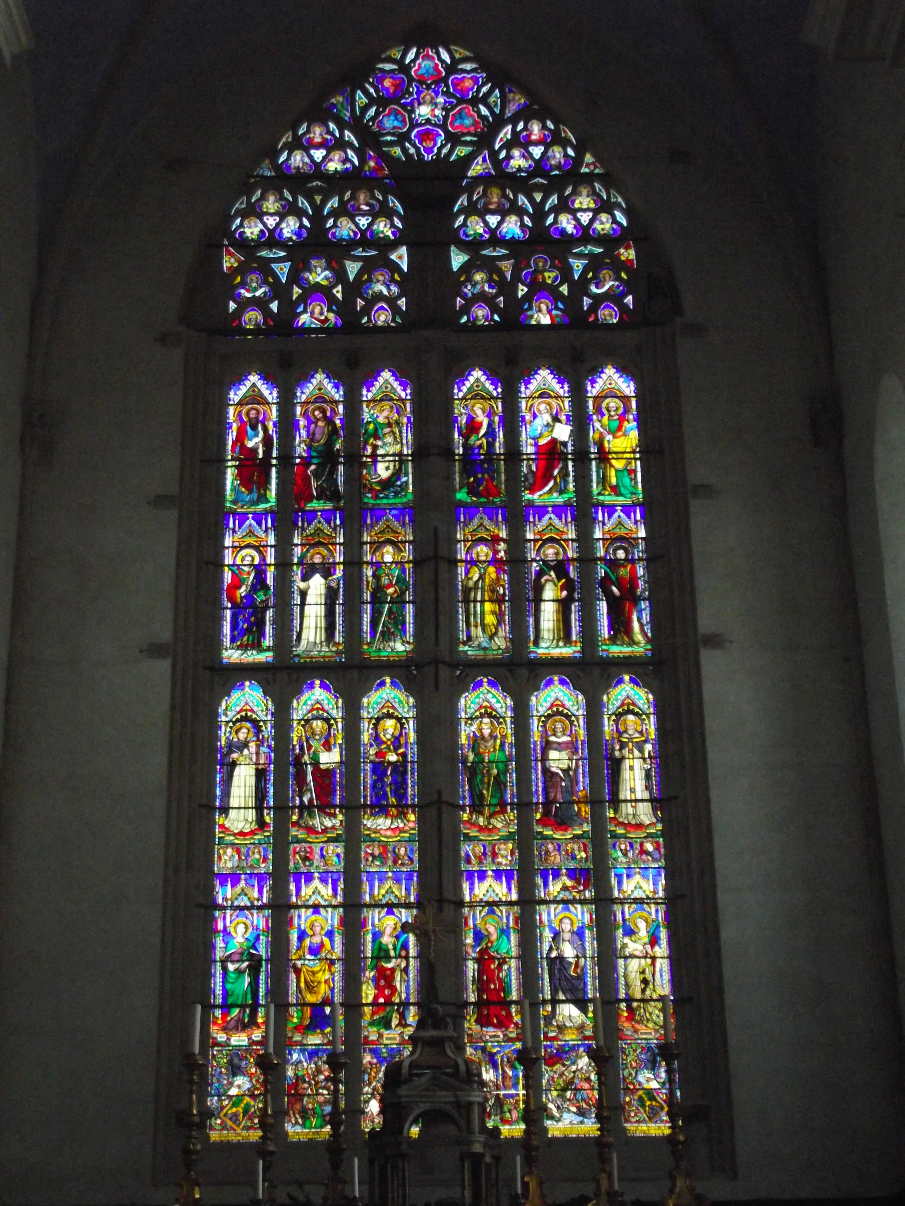 Perugia, Basilica di San Domenico